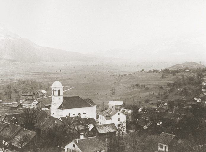 Mauren, Ende der 1920er-JahreBlick von Nordwesten auf die PfarrkircheRechts der Kirche das alte, 1980 abgebrochene Schulhaus